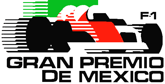 Logo del Gran Premio de México, basado en este logo